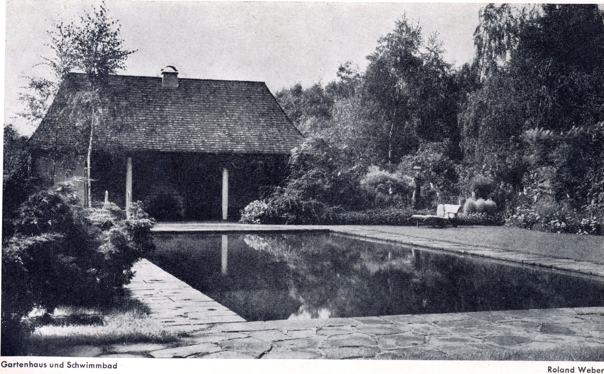 Foto von Hugo Schmölz (geb. 21. Januar 1879 in Sonthofen; gest. 27. April 1938 in Köln), Düsseldorf, Haus Roland Weber, An der alten Mühle 5 in Düsseldorf-Kalkum, 1951, Architekten Helmut Hentrich und Hans Heuser, Landschaftsarchitekt Roland Weber.jpg